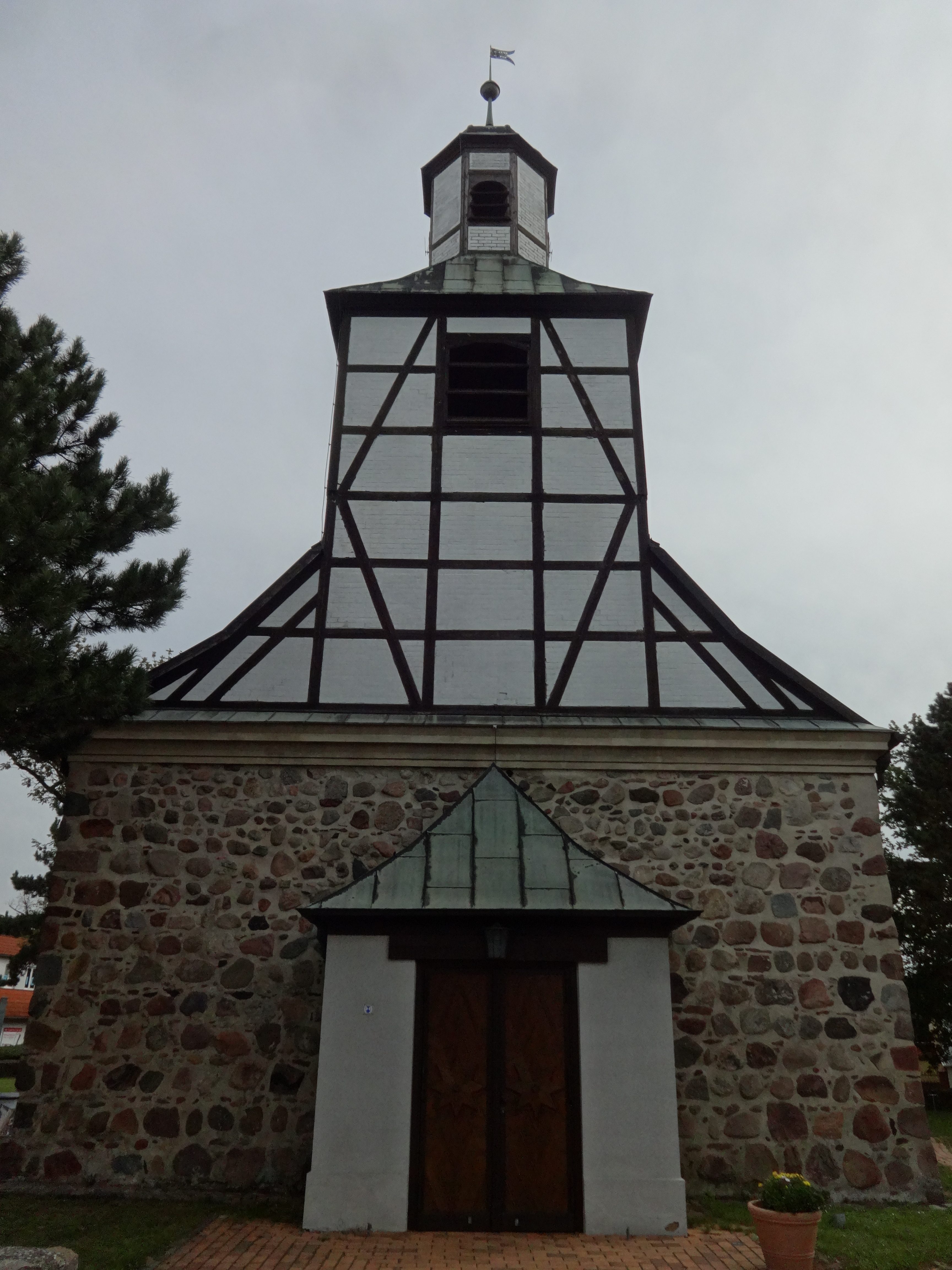 Die Dorfkirche in Blankenfelde der Gemeinde Blankenfelde-Mahlow im Landkreis Teltow-Fläming entstand aus Feldsteinen in der zweiten Hälfte des 13. Jahrhunderts. Die ursprünglich reichhaltige Ausstattung wurde bei einem Brand 1740 fast vollständig zerstört.